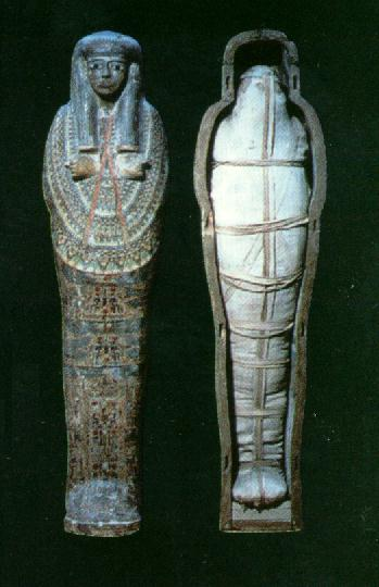 Múmia de uma sacerdotisa dentro do sarcófago.